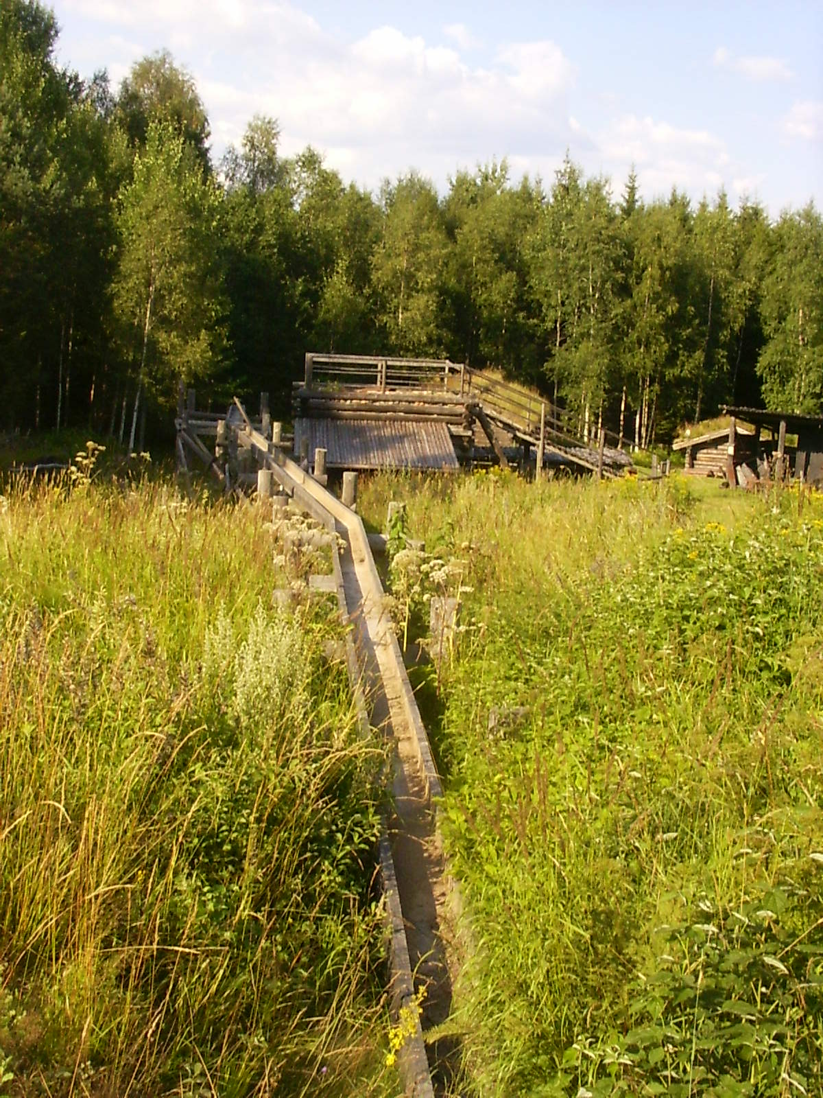 Nya Lapphyttan, kunstmatige waterkrachtgoot